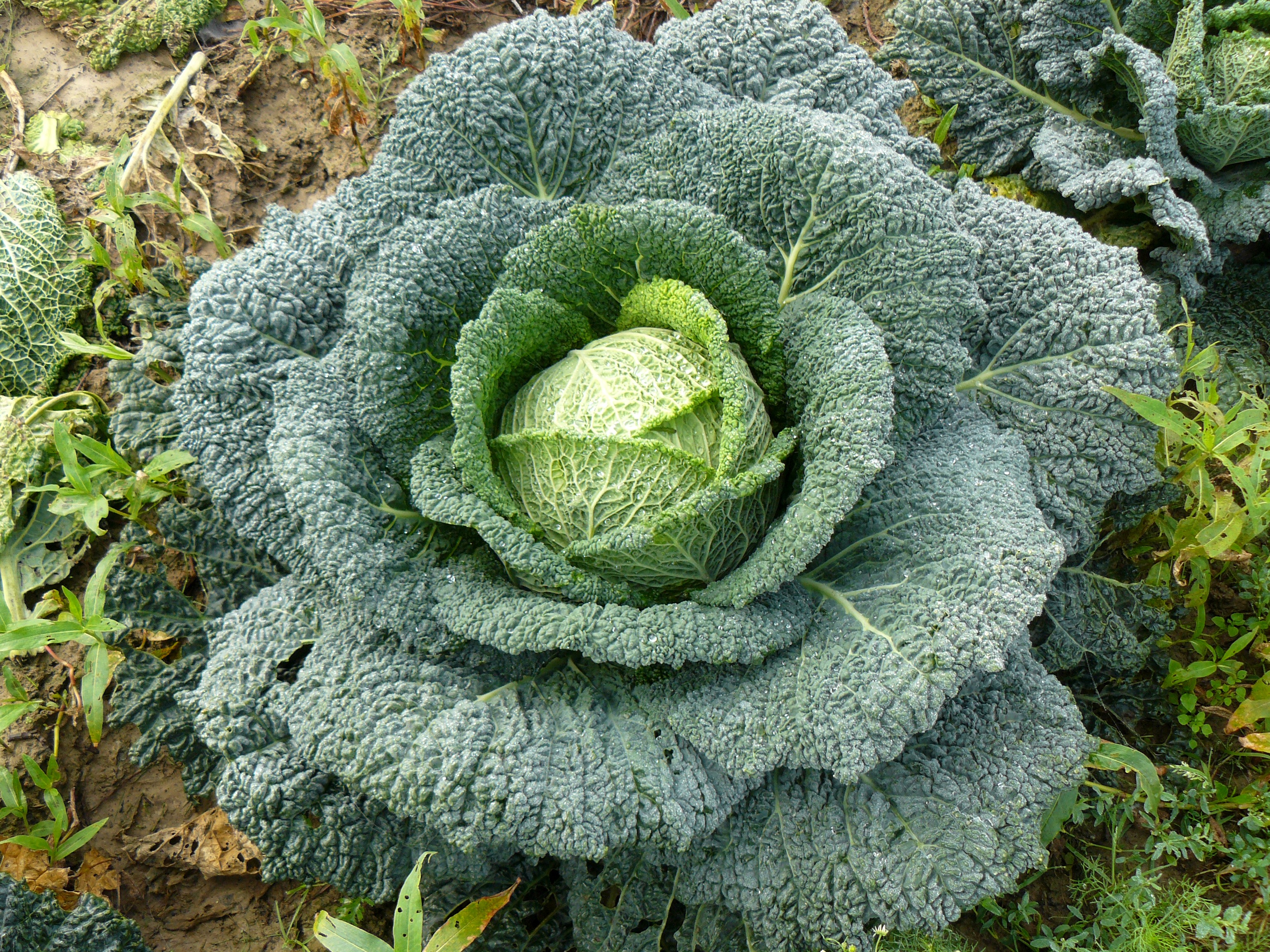 'Chou de Milan'